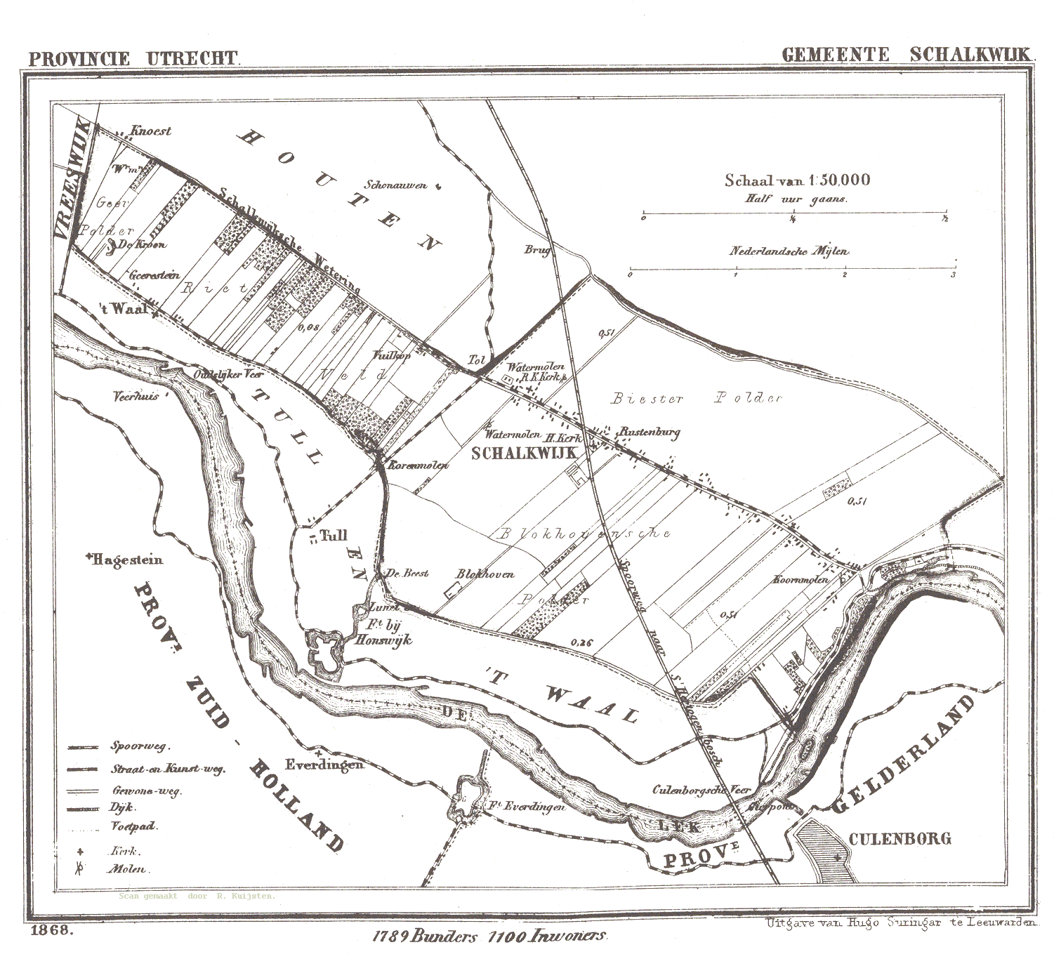 Kaart van Schalkwijk (Utrecht) uit Gemeente Atlas van Nederland, J. Kuyper 1865-1870, Uitgave Hugo Suringar Leeuwarden.